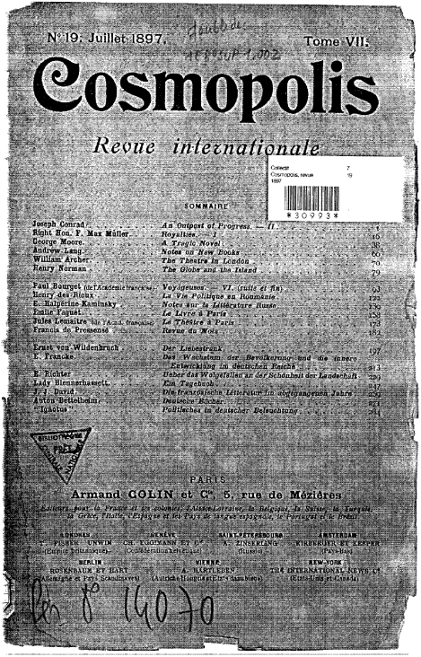 Couverture de la revue Cosmopolis de juillet 1897